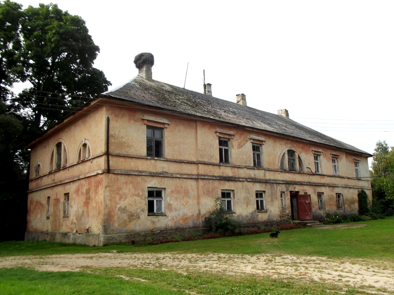 Lielsesavas muiža